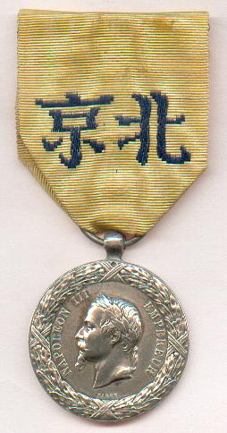 Médaille de l'expédition de Chine - 1860 - Second empire